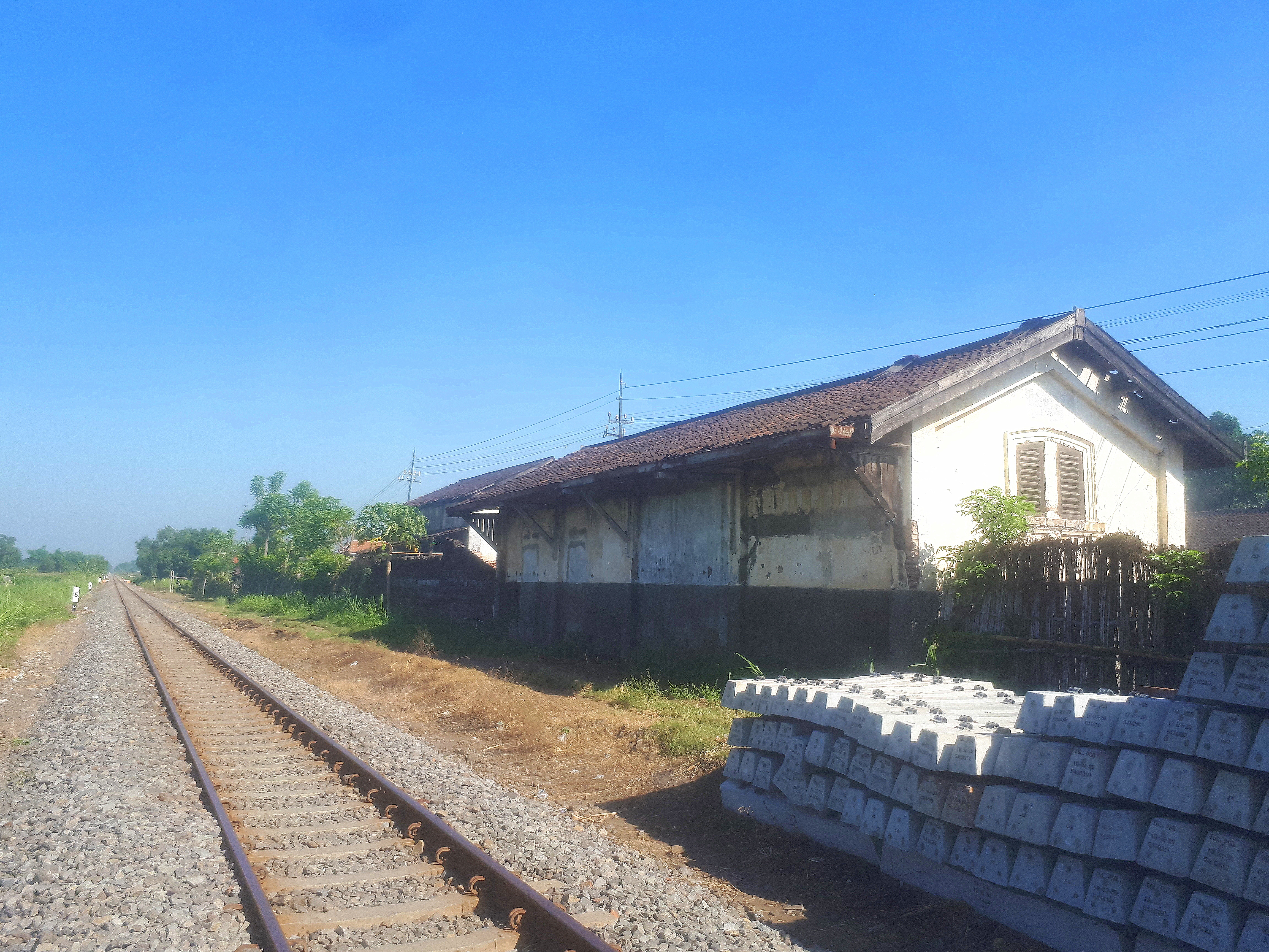 Tampak luar Stasiun Nguling, 2020